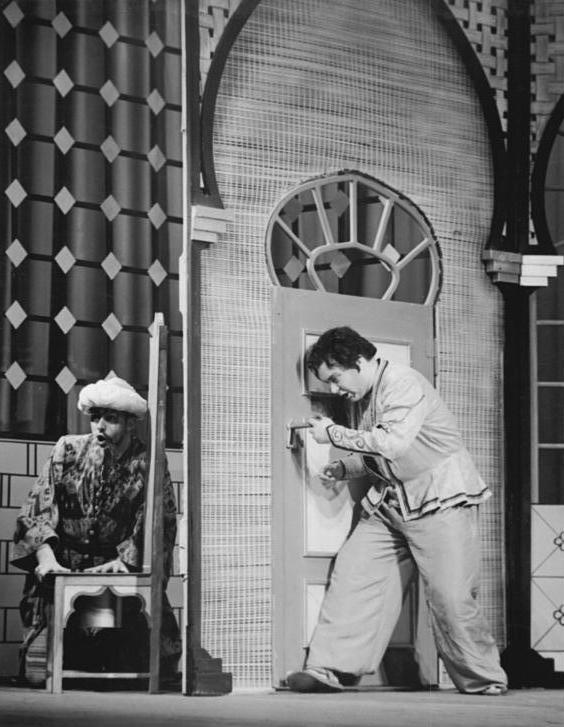 Zentralbild Hochneder 10.6.1960 2. Arbeiterfestspiele des FDGB. "Abu Hassan" von einem Arbeitertheater aufgeführt. "Abu Hassan", eine heitere Oper von Carl Maria von Weber wurde als Gastspiel des Arbeitertheaters Dresdens-Niedersedlitz am 7.6.1960 im Festspielort Aue aufgeführt. Diese Operninszenierung ist die erste, die ein Arbeitertheater in Zusammenarbeit mit Berufskünstlern einstudiert hat. UBz: Szenenbild mit Abu Hassan (links: Peter Schreier - Staatsoper Dresden) und dem Kalifen (Erich Siebenschuh - Staatsoper Dresden).